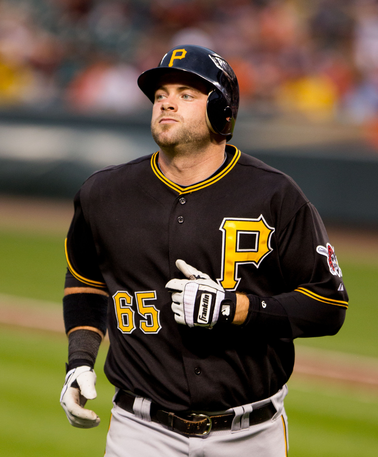 Matt Hague